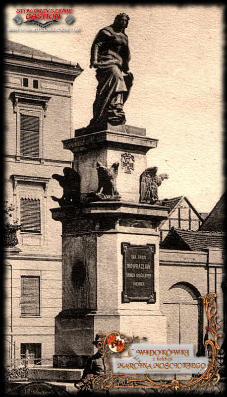 Pomnik ku czci poległych w wojnie francusko-pruskiej 1870/71, pierwotnie zlokalizowany na inowrocławskim Rynku.